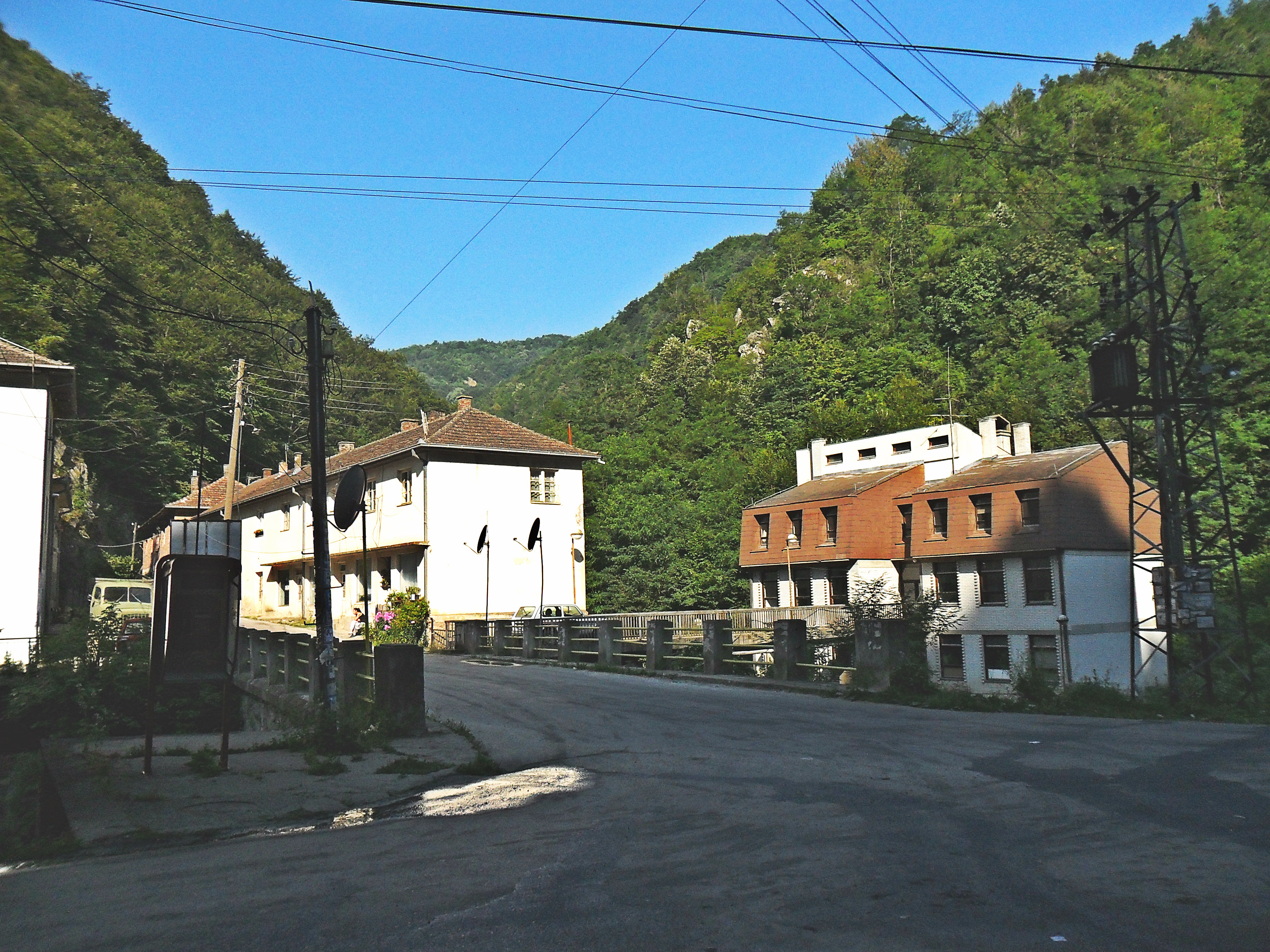 Српски (ћирилица): Састав река поглед на мост